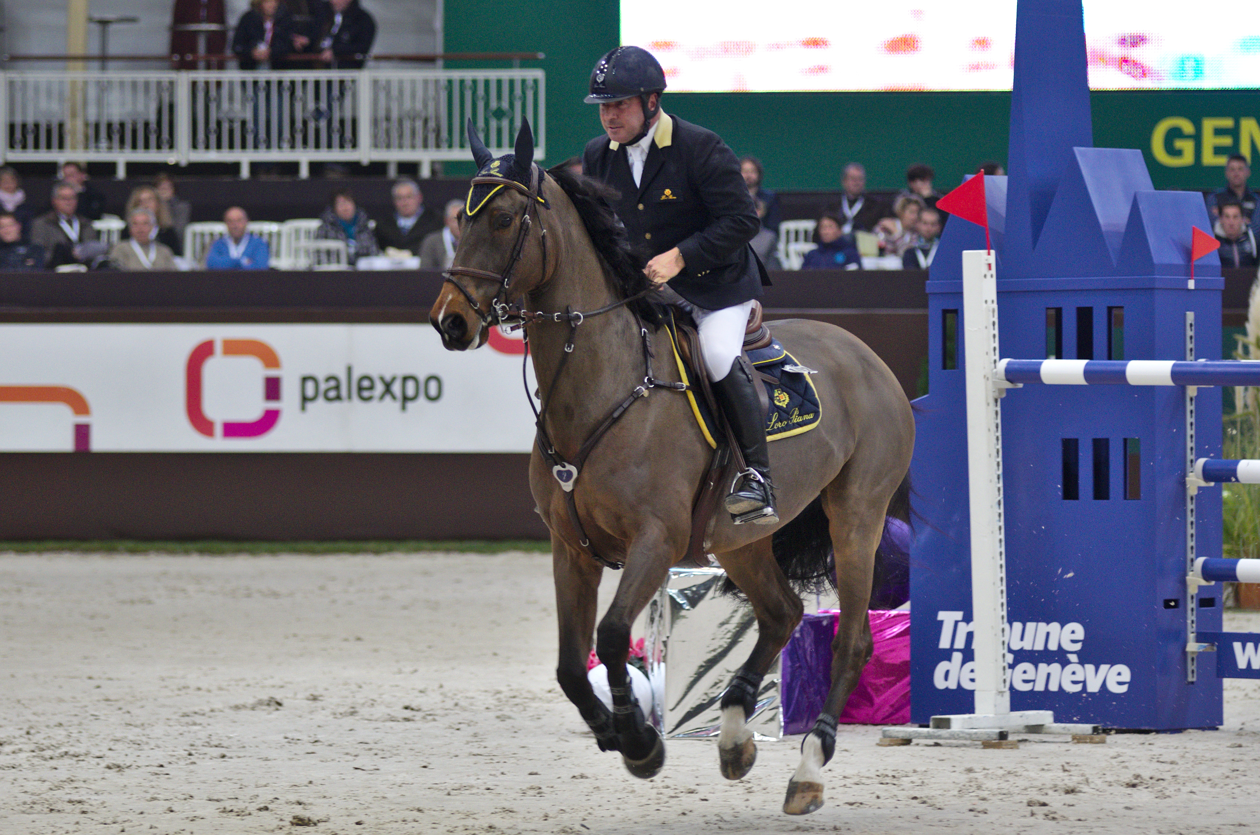 CHI Genève 2013 - 20131212 - Philippe Le Jeune et Loro Piana Carlino